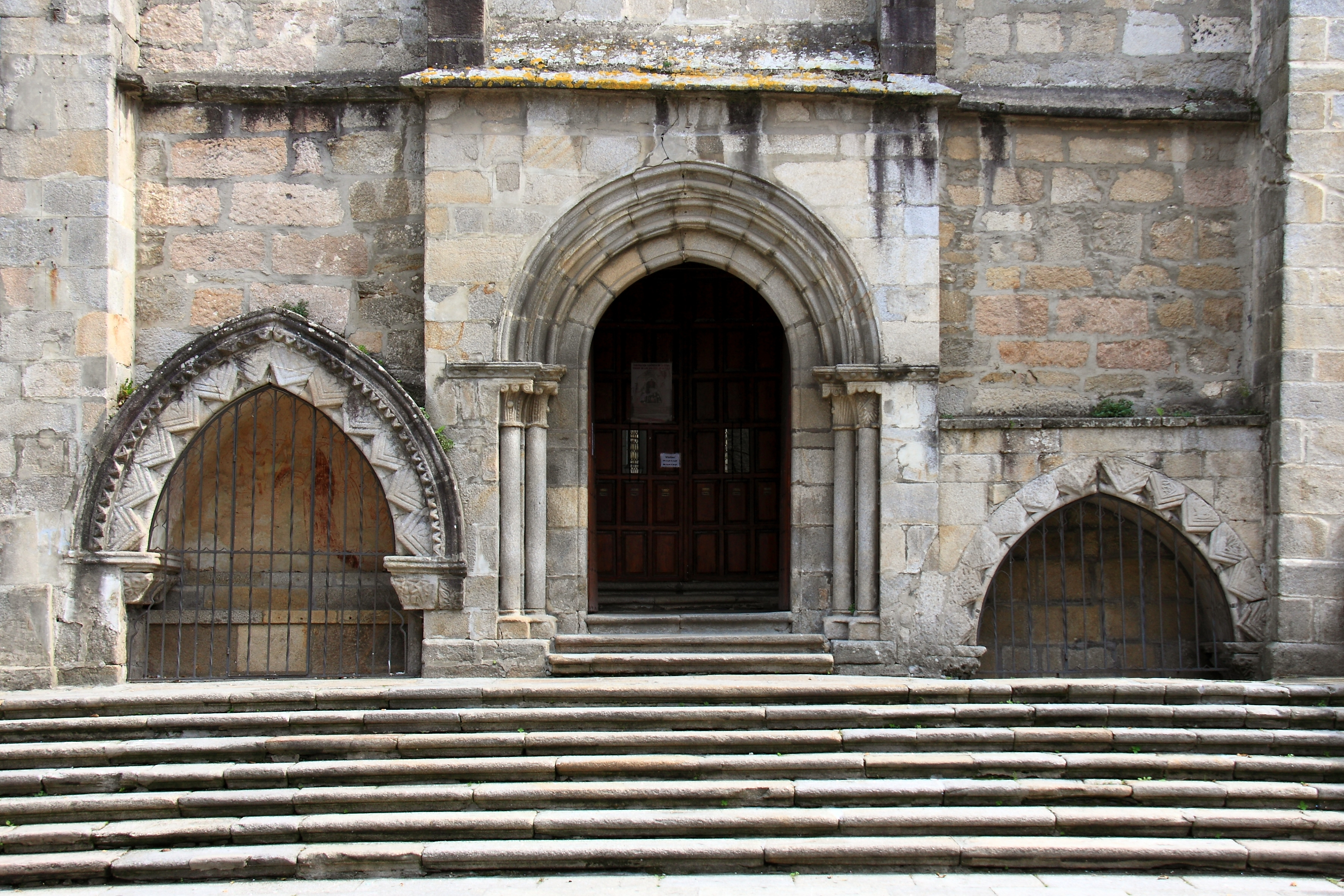 Viveiro, iglesia y convento de San Francisco